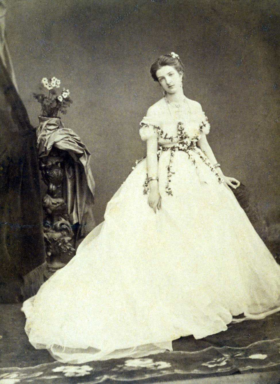 Margherita di Savoia. Fonte: archivio personale.